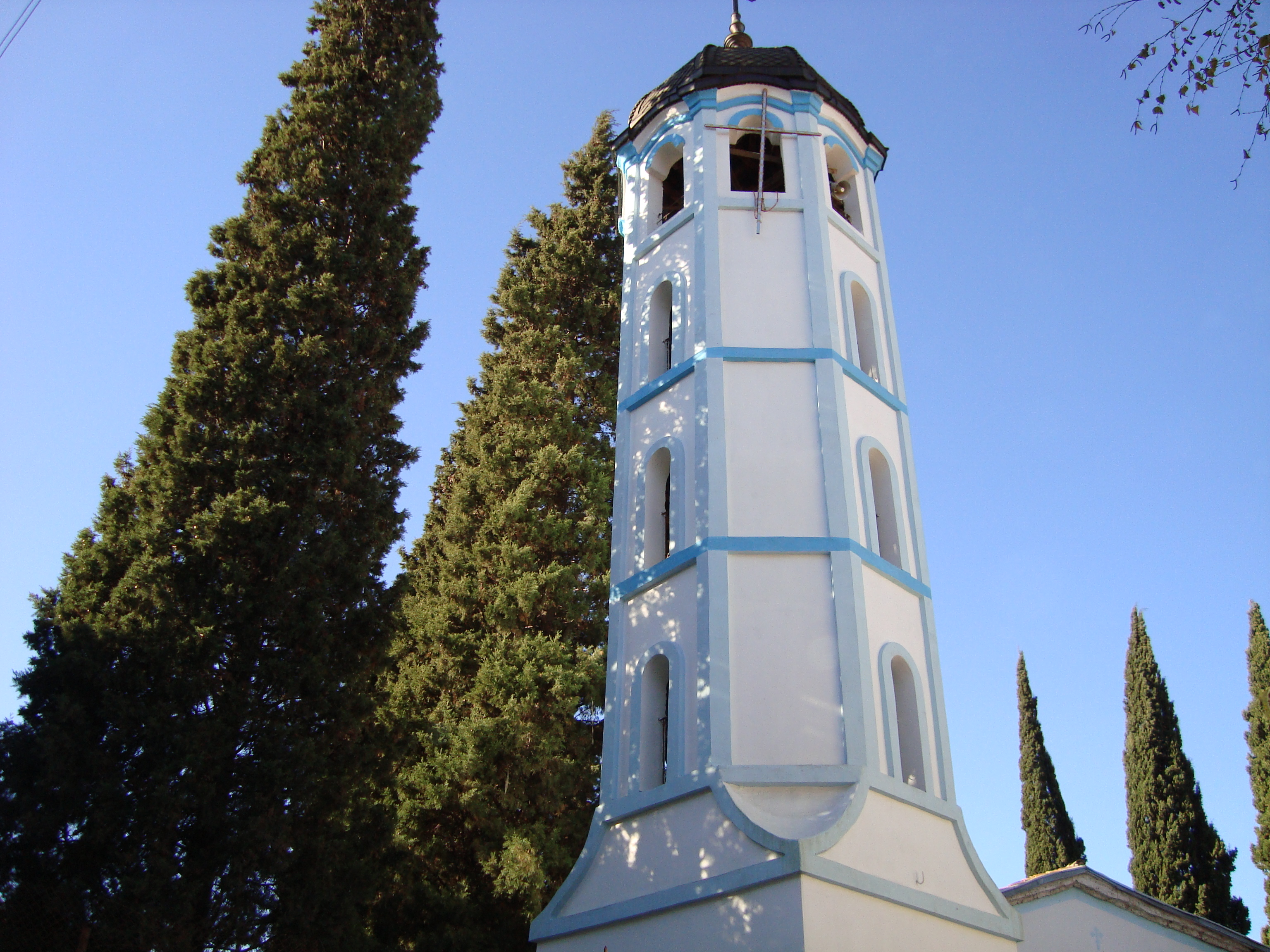 Храм "Свети Никола", Асеновград